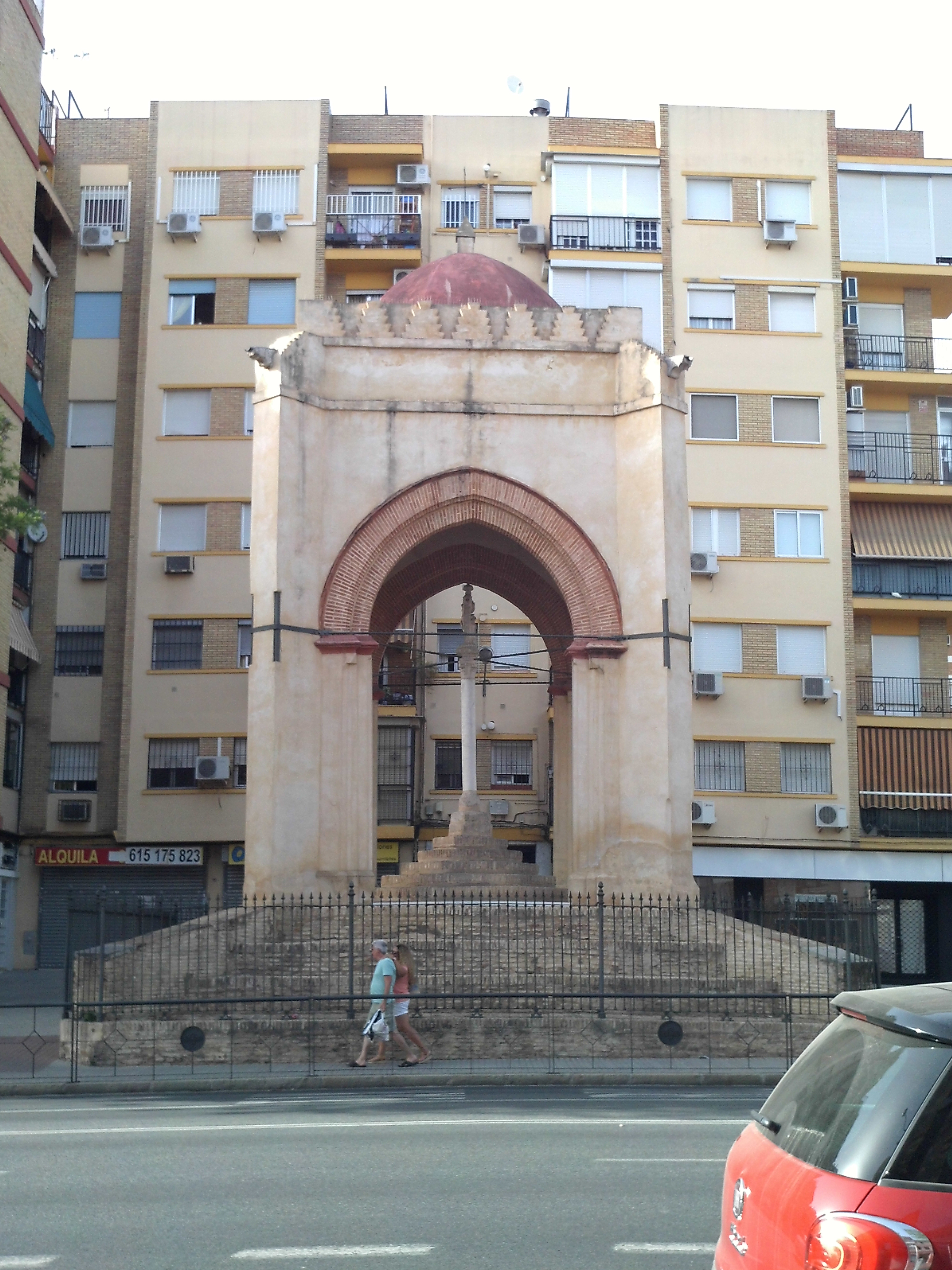 Cruz del Campo. Sevilla, Andalucía, España.